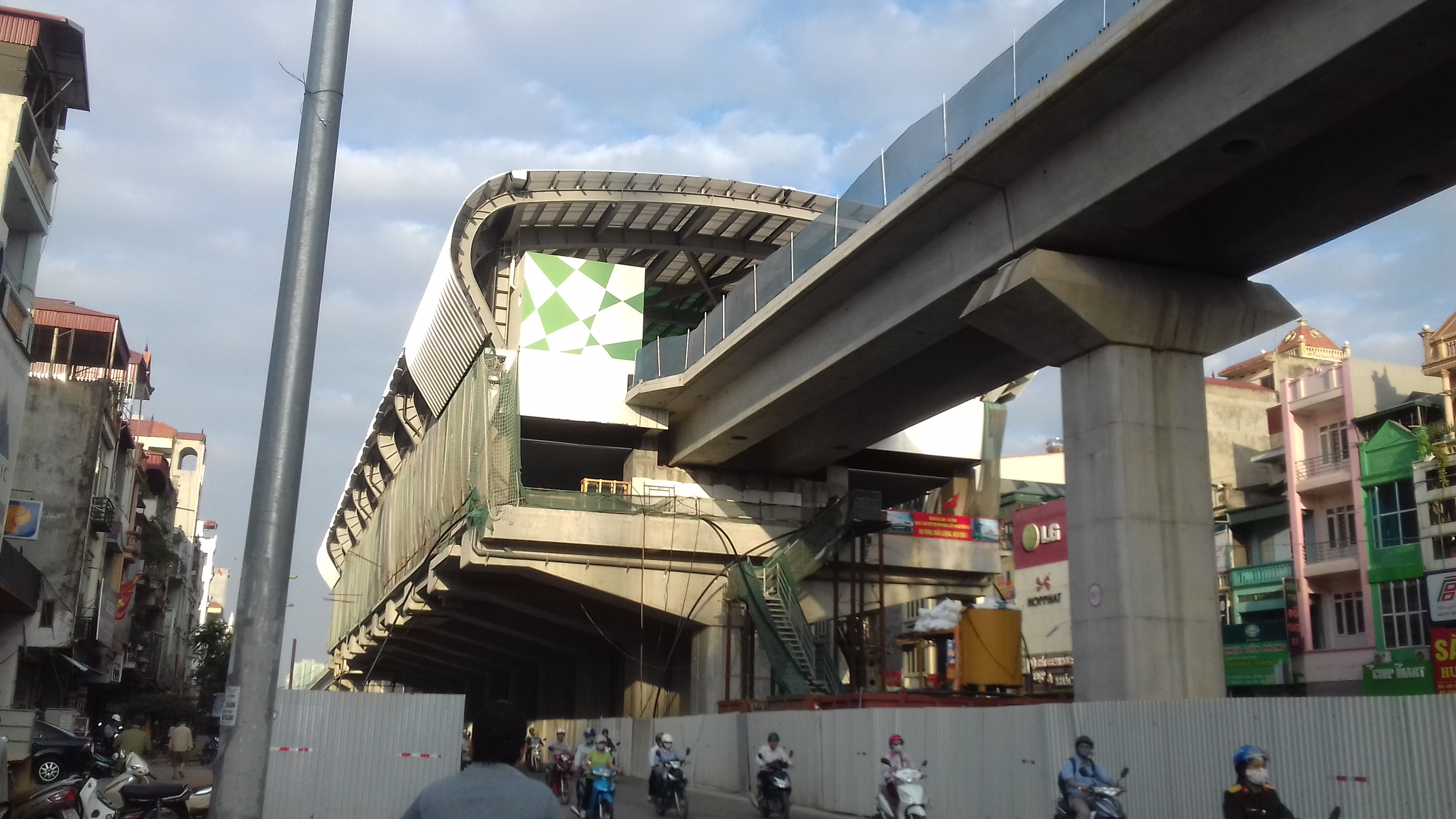 Nhà ga La Khê - ga đầu tiên được hoàn thiện của tuyến 2A